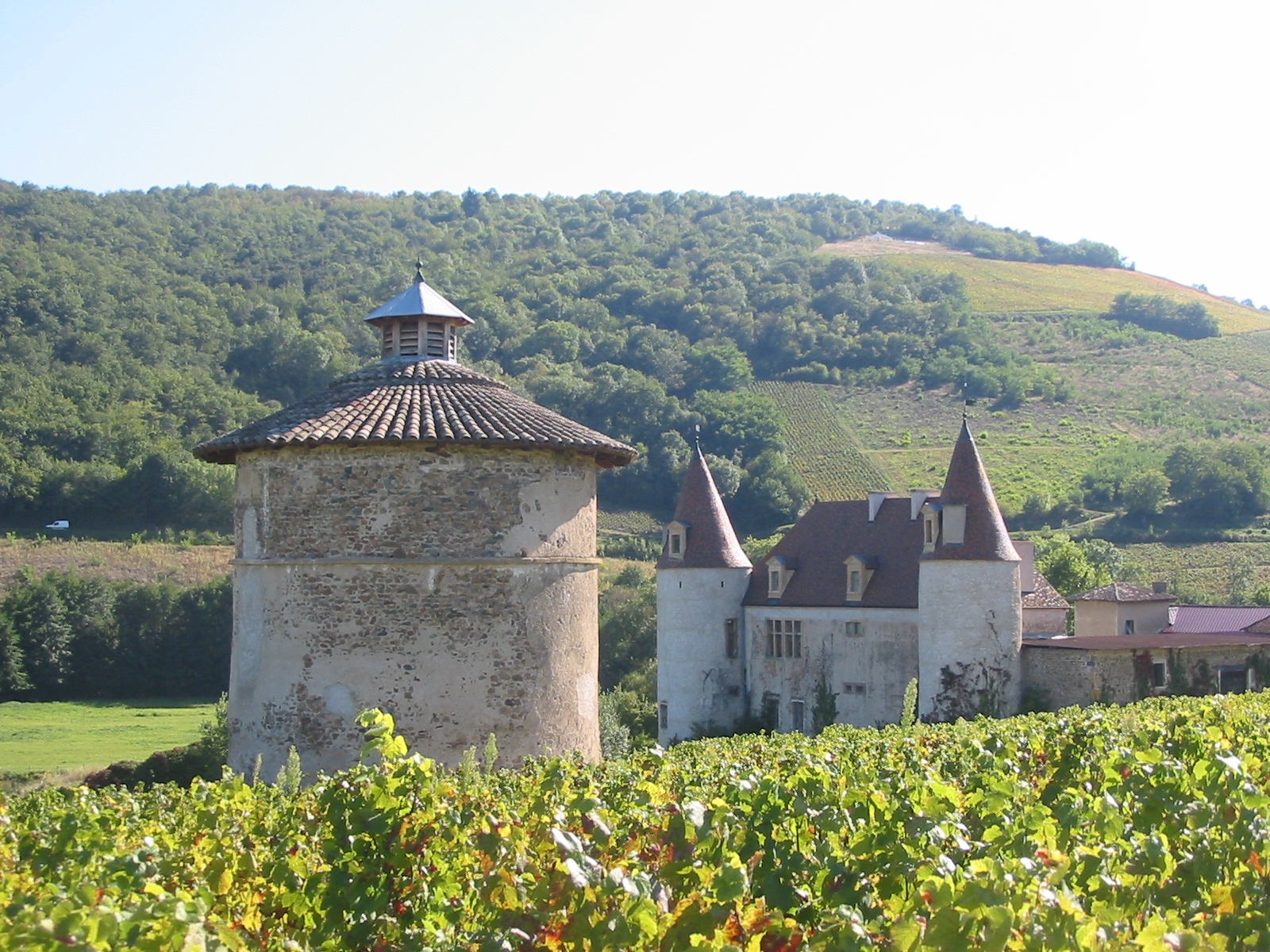 Château de La Palud avec son pigeonnier